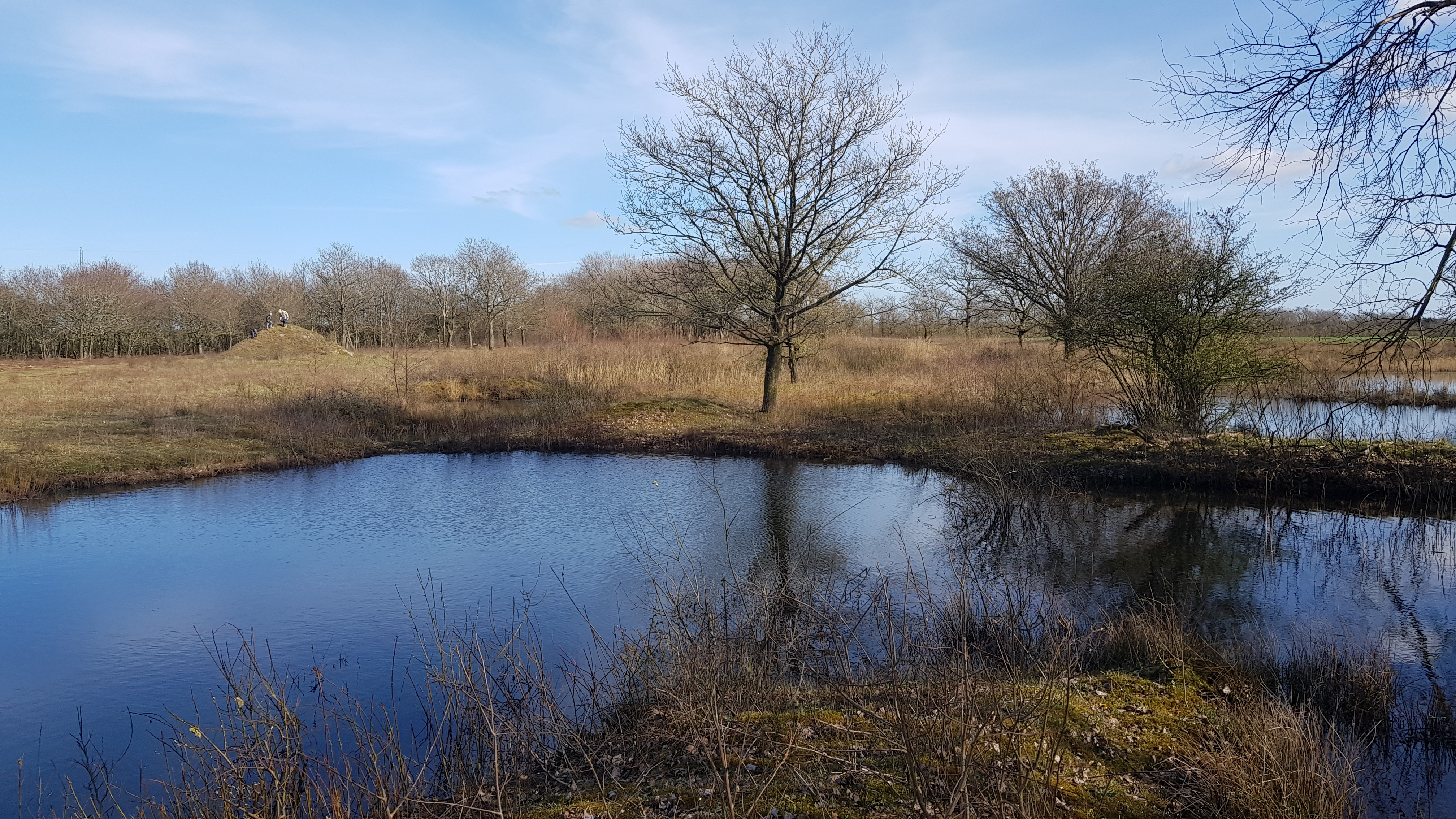 Lustrup Fællesjord